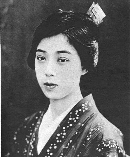 五味國枝、1925年の写真